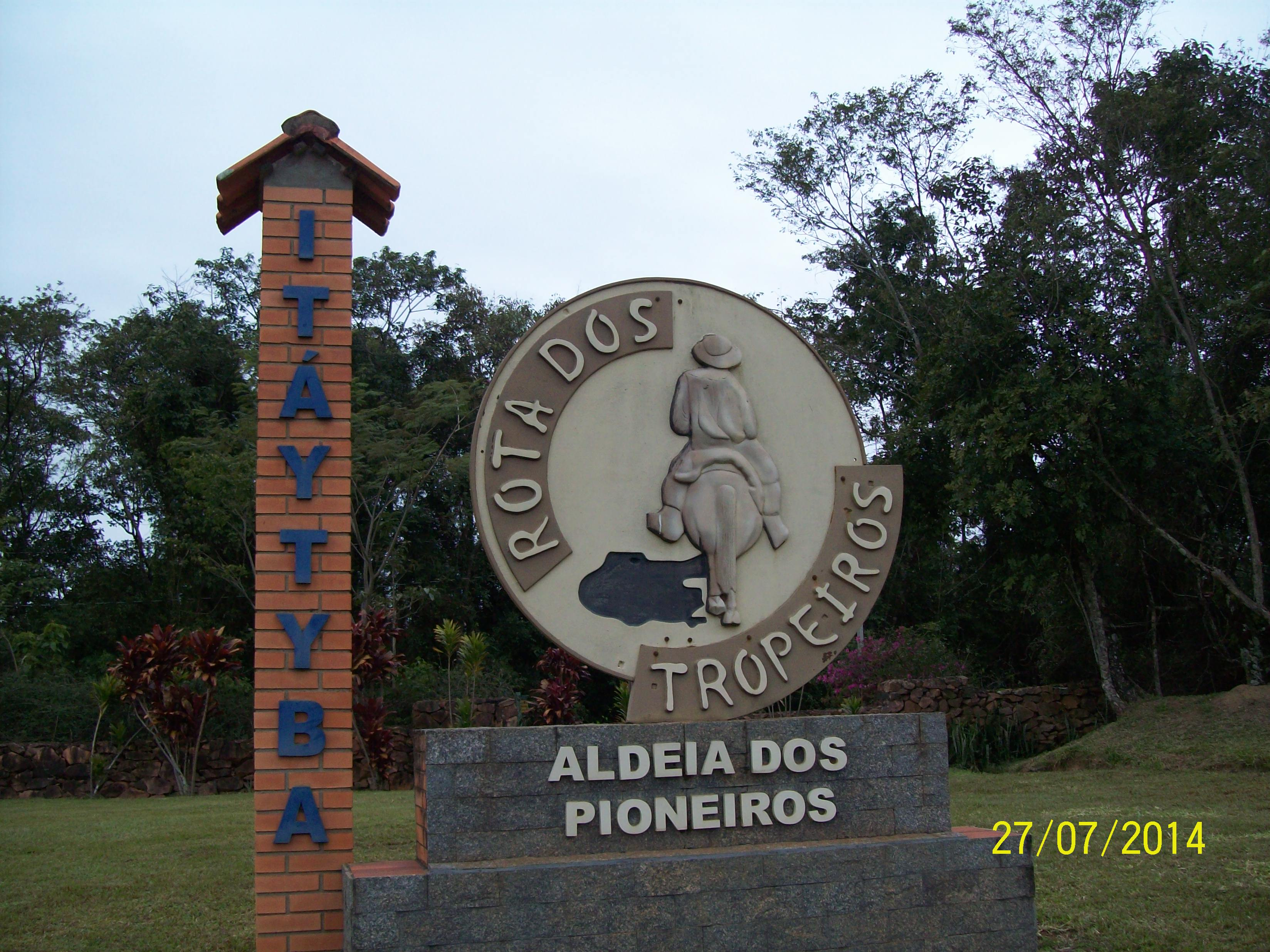 Tibagi PR Brasil - Pousada Itatyba